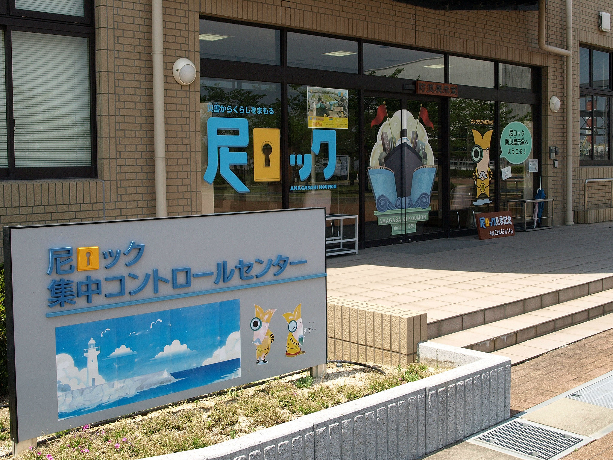 尼崎閘門 集中コントロールセンター 1階・防災展示室 ※防災展示室一般開放日に撮影